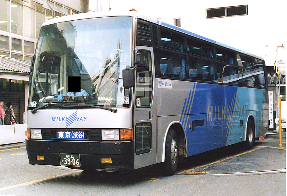 東急バス ミルキーウェイ 日本海ハイウェイ夕日